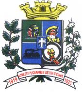 Brasão de Promissão, São Paulo, Brasil